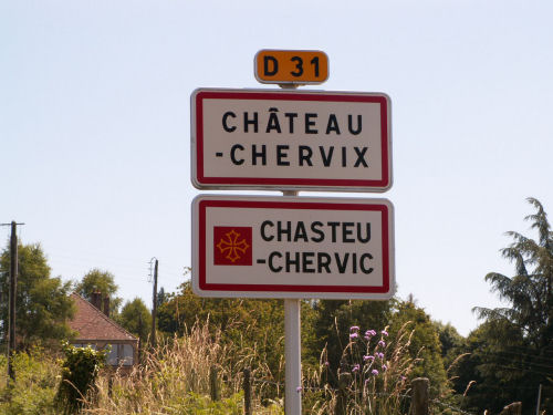 Panneau bilingue à Château-Chervix (Haute-Vienne, France).